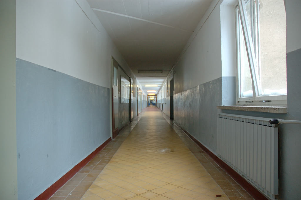 Prora - Innenansicht eines Flures